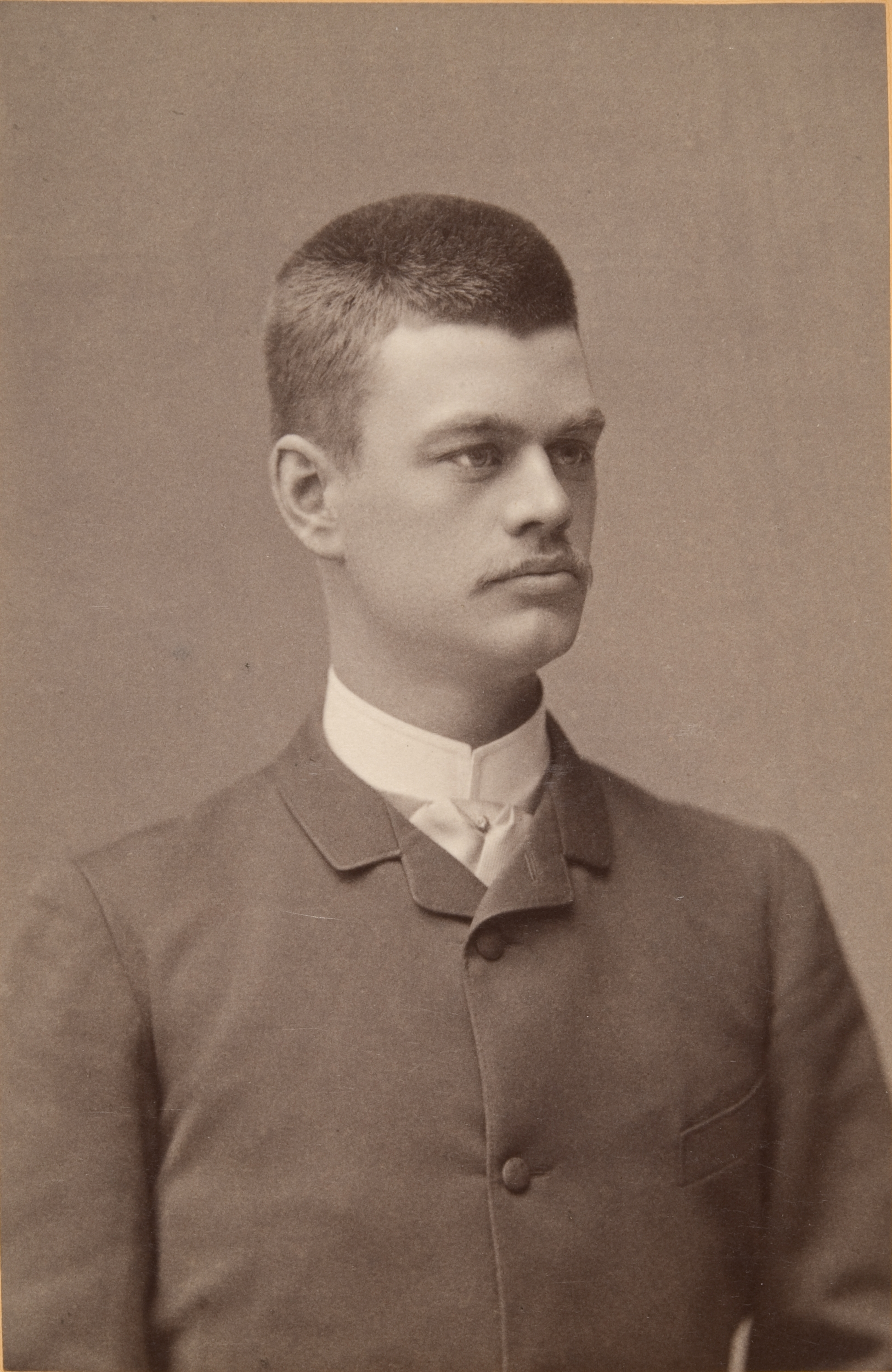 Вильгельм Рамзай (Рамси)